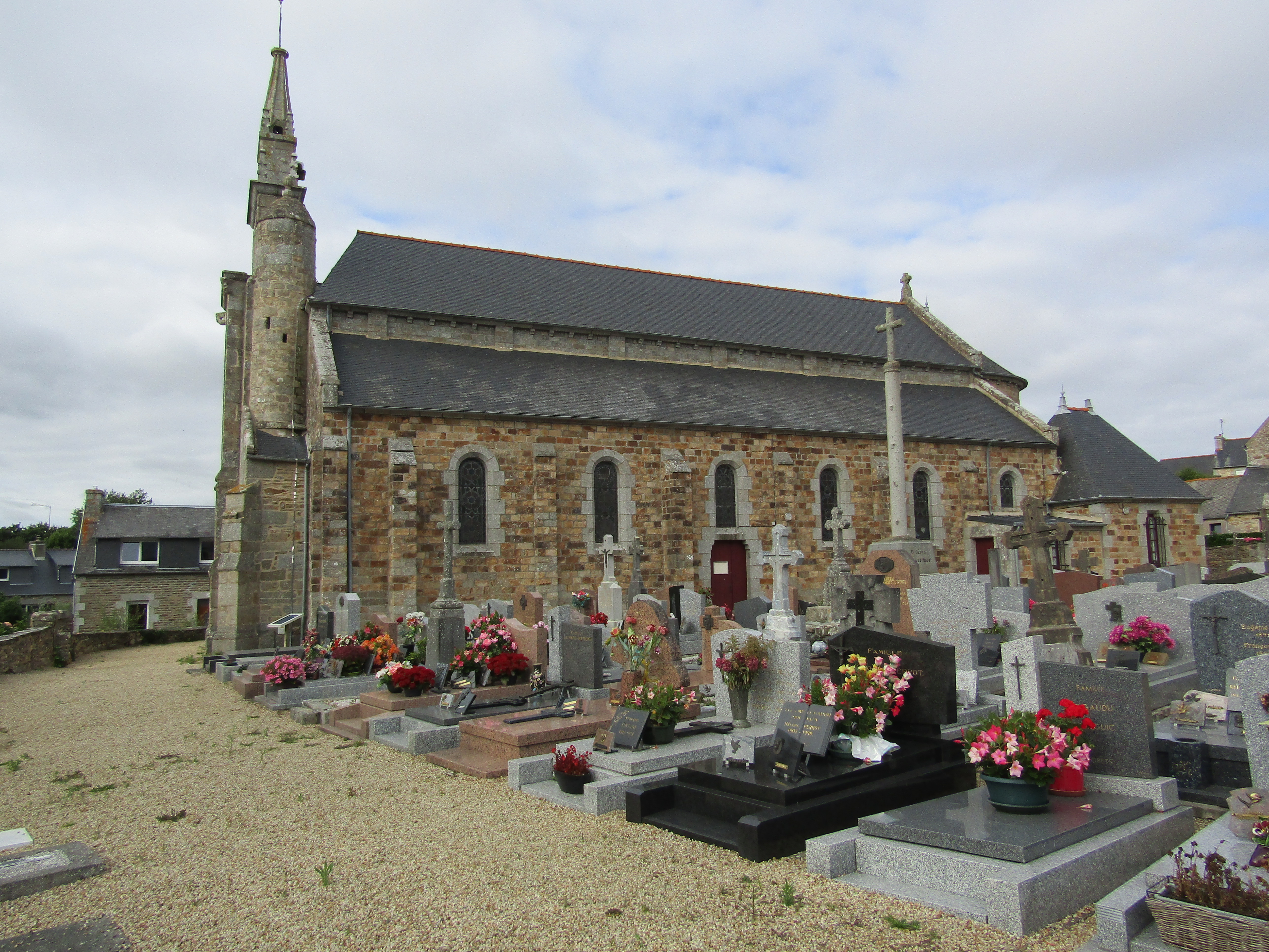 Eglise Saint-Maudez de Coatascorn